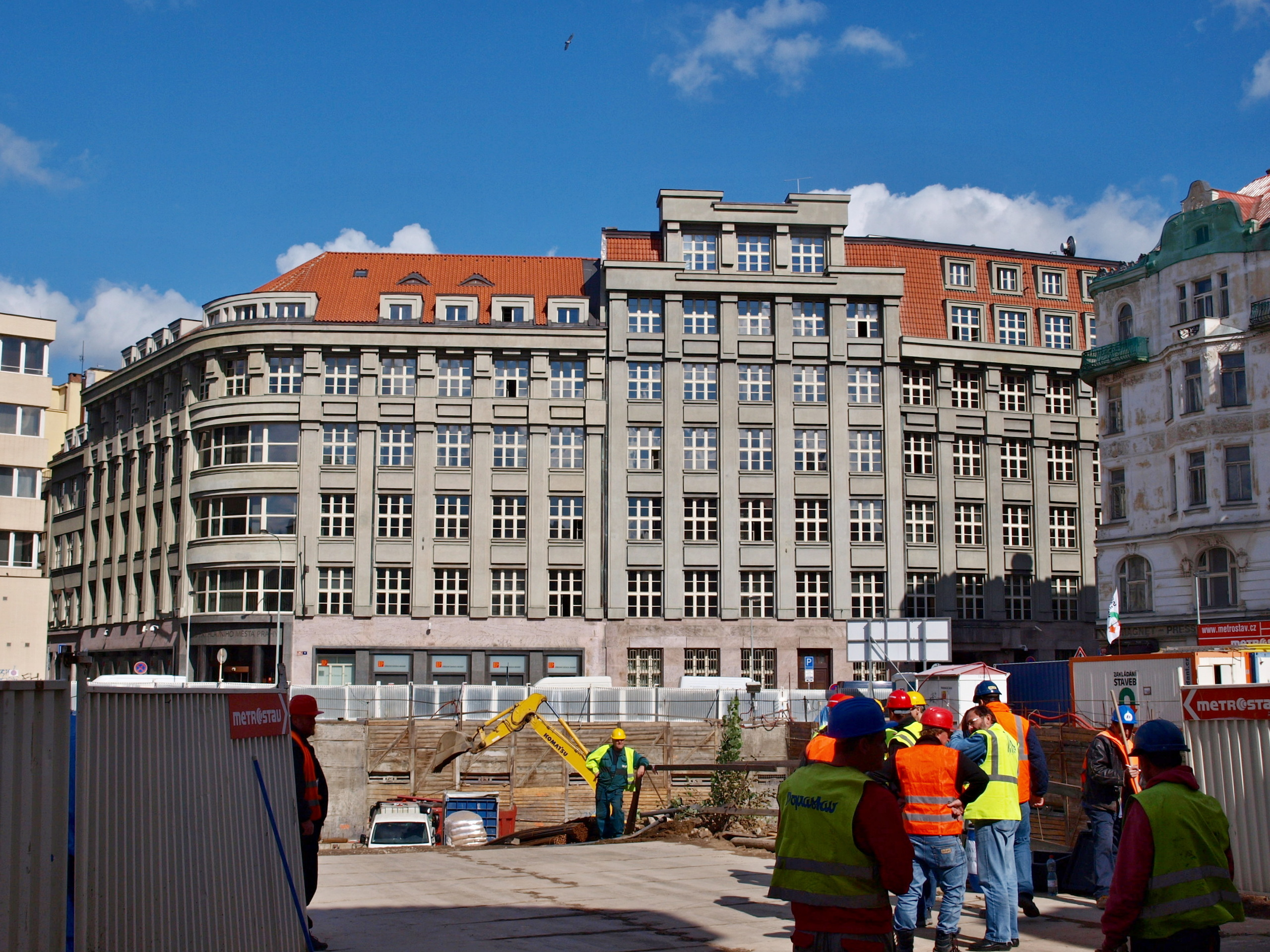 Škodův palác a výstavba paláce Quadrio